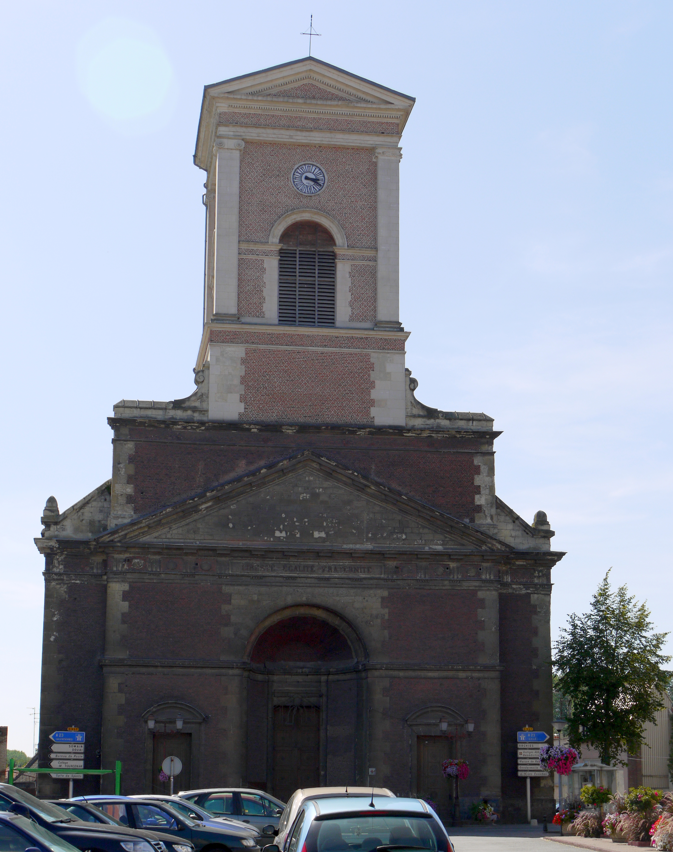 Église Sainte-Rictrude de Marchiennes, Place du Général-de-Gaulle (Inscrit, 1992) .